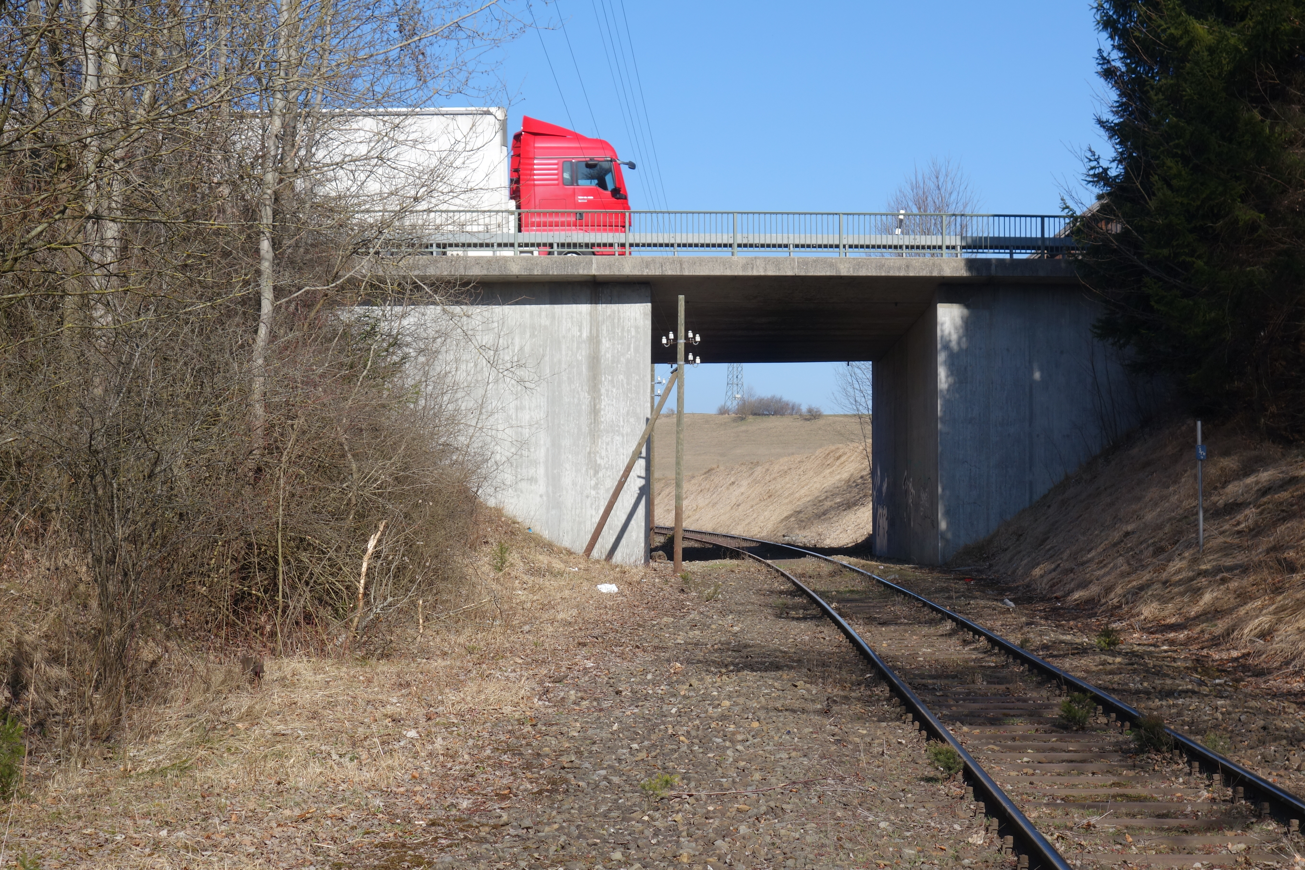 Überführung der Ortsverbindungsstraße Hohenfurch–Schongau (bis 1994 Teilstück der Bundesstraße 17) über die Bahnstrecke Landsberg am Lech–Schongau (bei km 27,3 östlich des Schongauer Krankenhauses). Links neben dem bestehenden Gleis ist die Trasse des eigenen Gleises für die kurz hinter der Brücke abzweigende Bahnstrecke Kaufbeuren–Schongau zu erkennen, das anlässlich des Brückenbaues 1983 aufgelassen wurde, um beim Brückenbau Kosten zu sparen. Blickrichtung Nordwesten, Zustand März 2014.